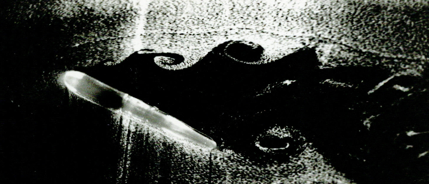 Strömungssichtbarmachung an einem Flügel-Profil mittels Gasbläschen in Wasser, großer Anstellwinkel